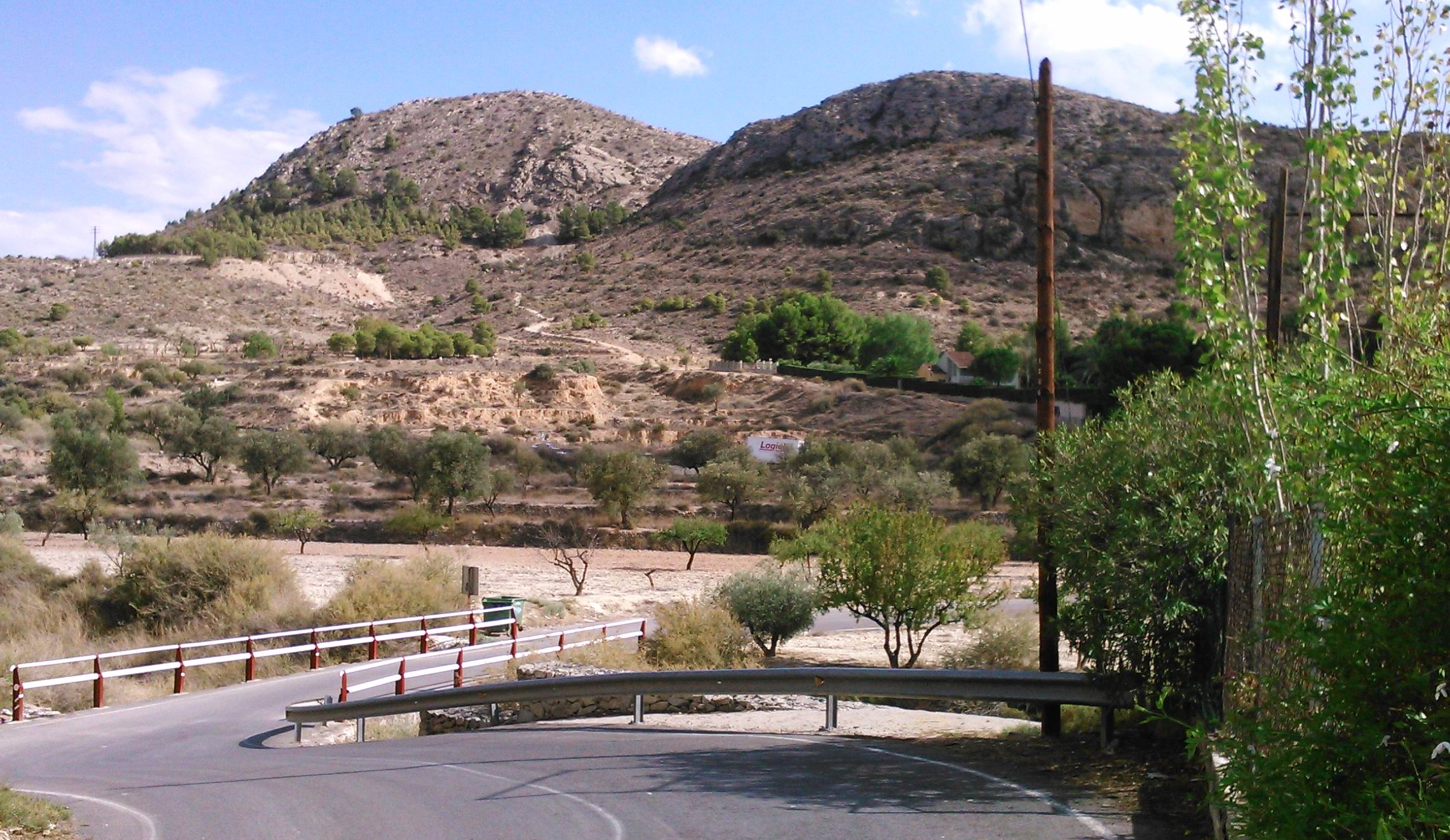 Peña del Sol, en la Sierra de Bateig. Elda.